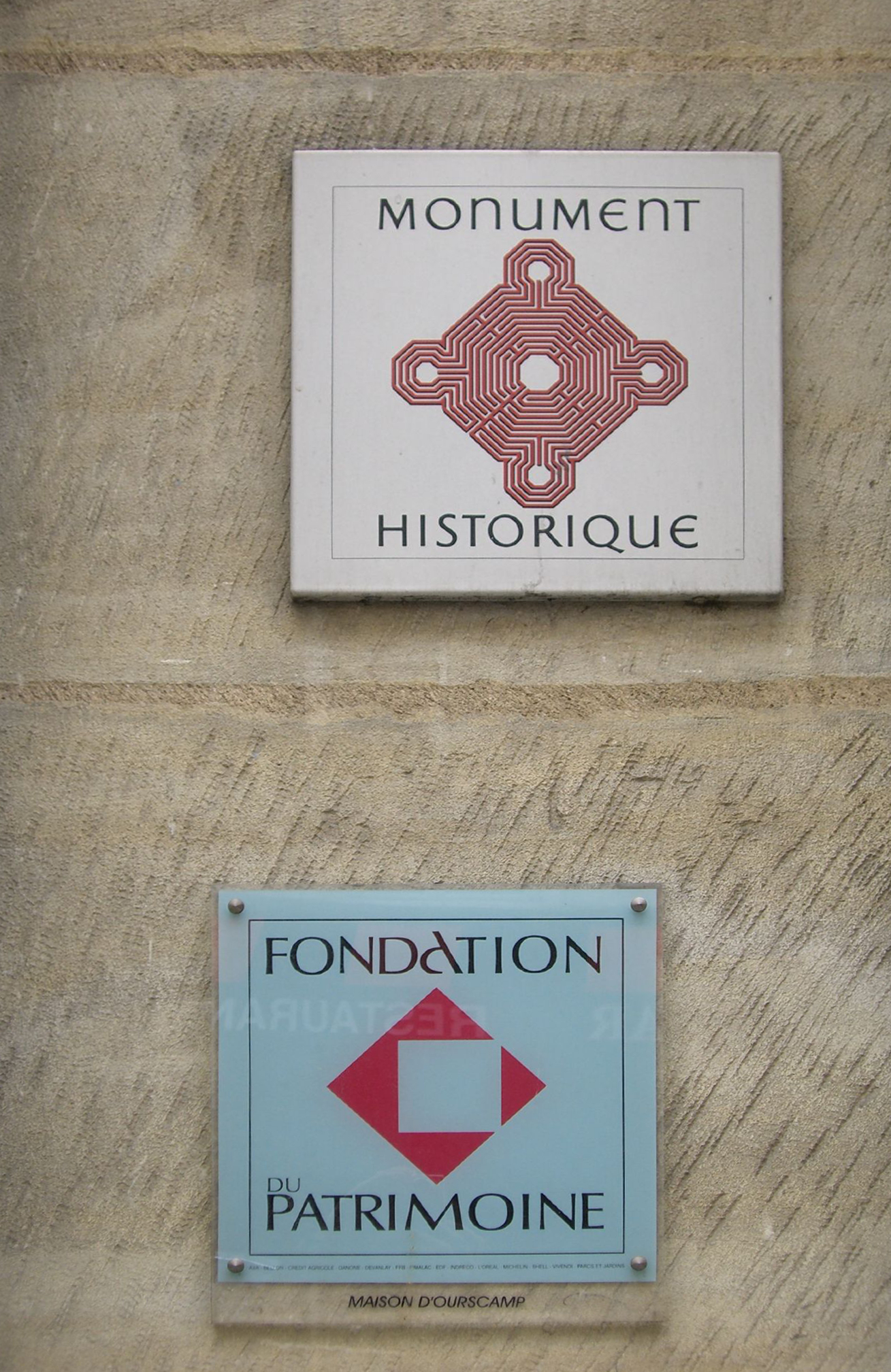 Paris historique, Rue François-Miron, Paris.